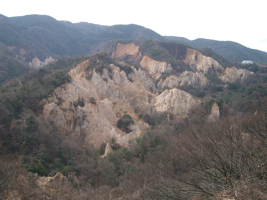 蓬莱峡(Horai-kyo)